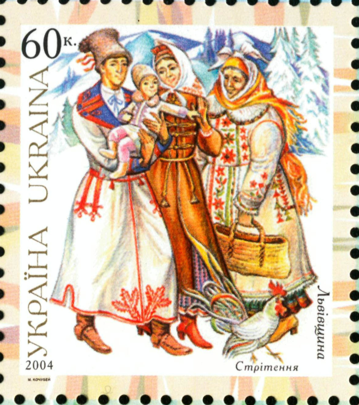 Марка серії "Український традиційний одяг" 2004 р. Львівщина. Стрітення